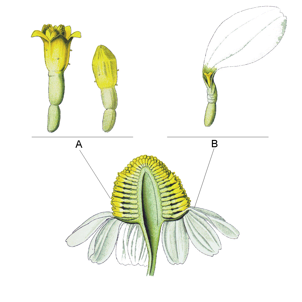 Matricaria recutita - Sezione longitudinale del capolino con ingrandimento dei flosculiA.Flosculi del disco; B.Flosculo del raggio